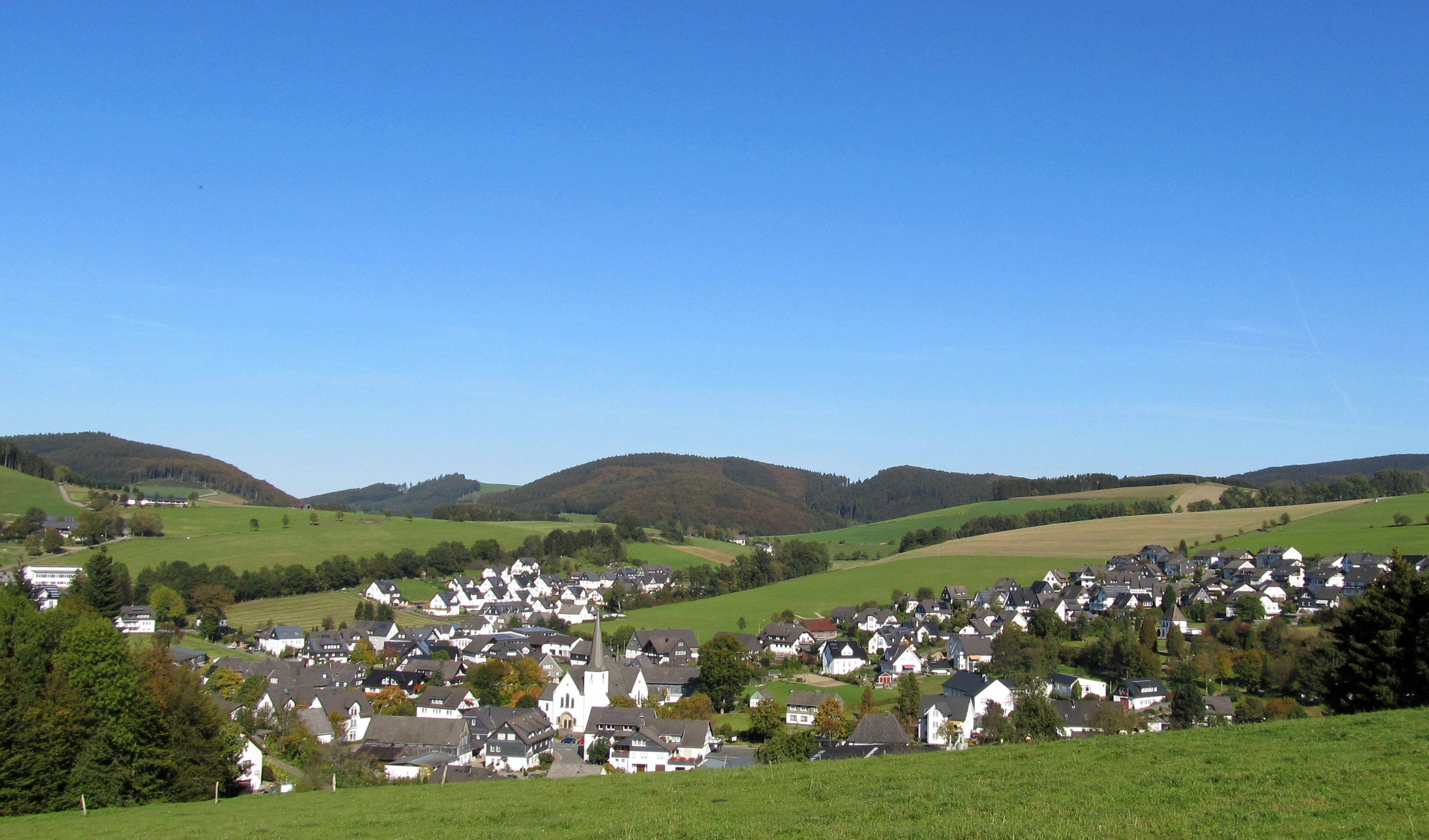 Schmallenberg-Dorlar (Germany)